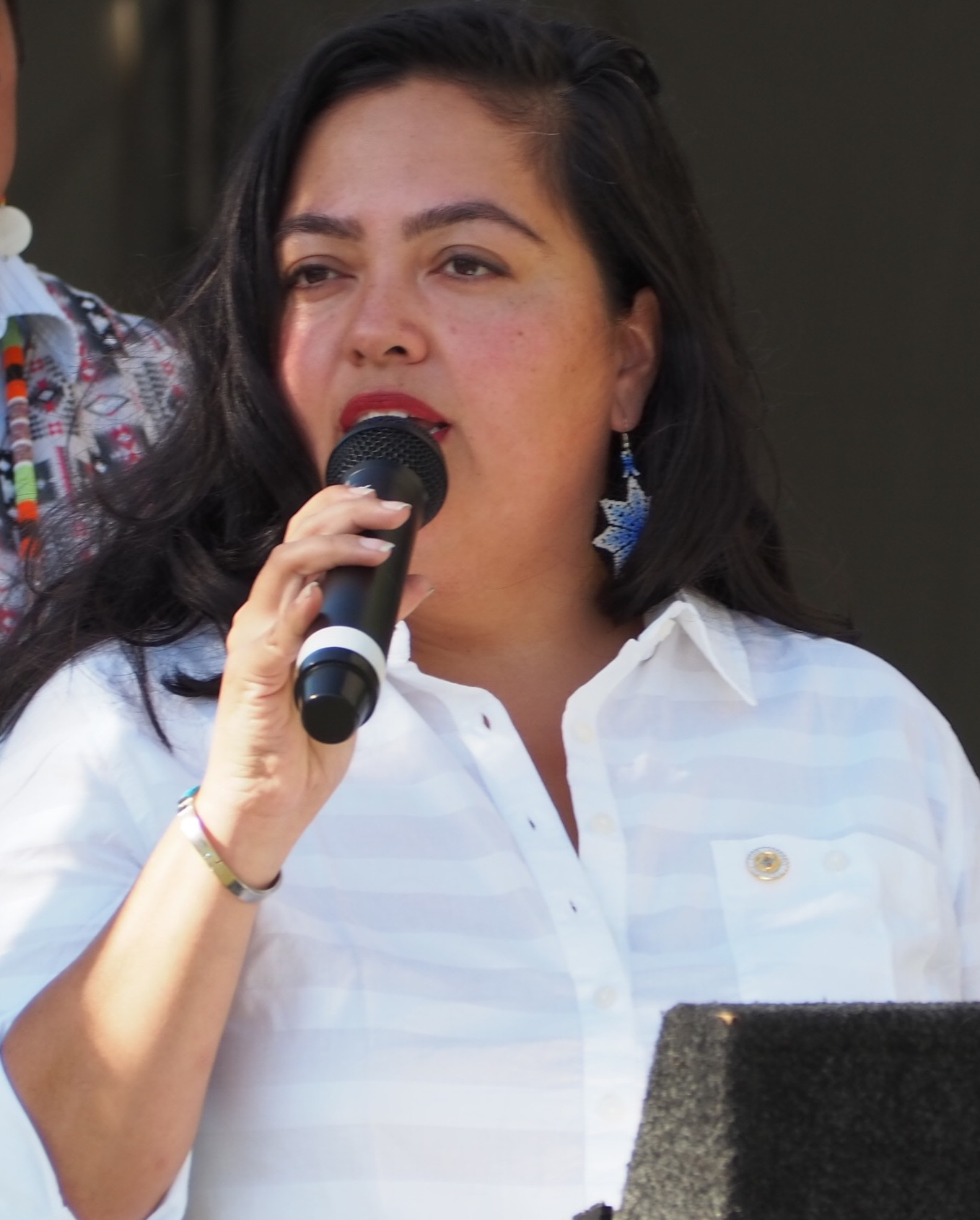 California State Assemblywoman Wendy Carrillo (D-Los Angeles) was among the elected officials in attendance at the city of L.A.'s first Indigenous Peoples Day celebration on Oct. 8, 2018.